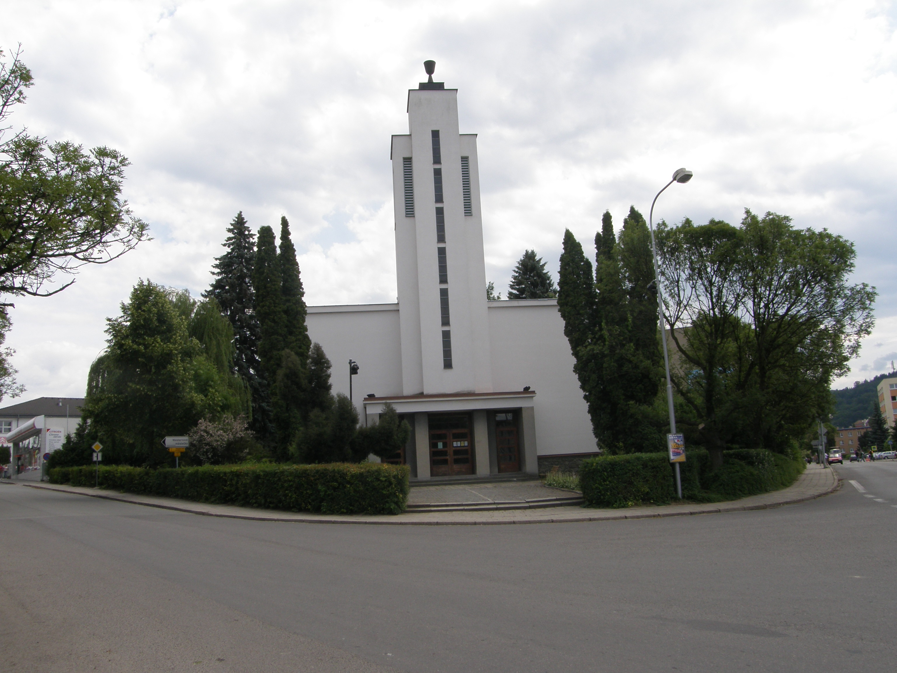 Evangelický kostel v Boskovicích